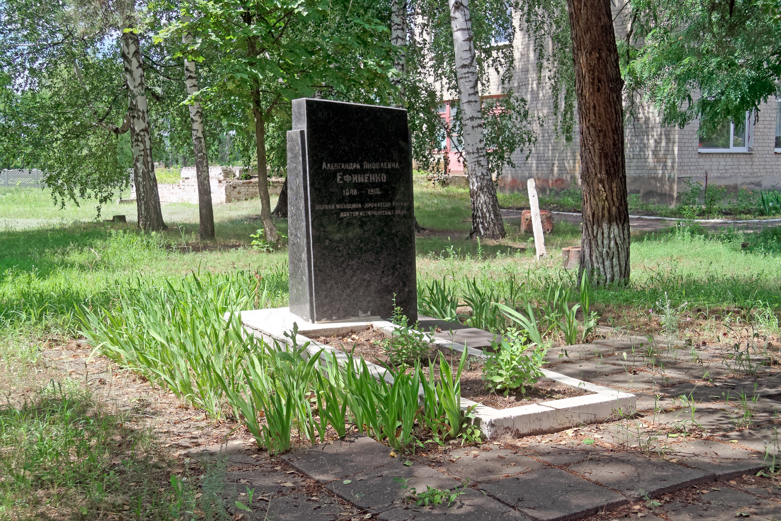 Бугаївка, Харківська область. Могила доктора історичних наук, професора Олександри Яківни Єфименко на території Бугаївської загальноосвітньої школи I - III ступенів.